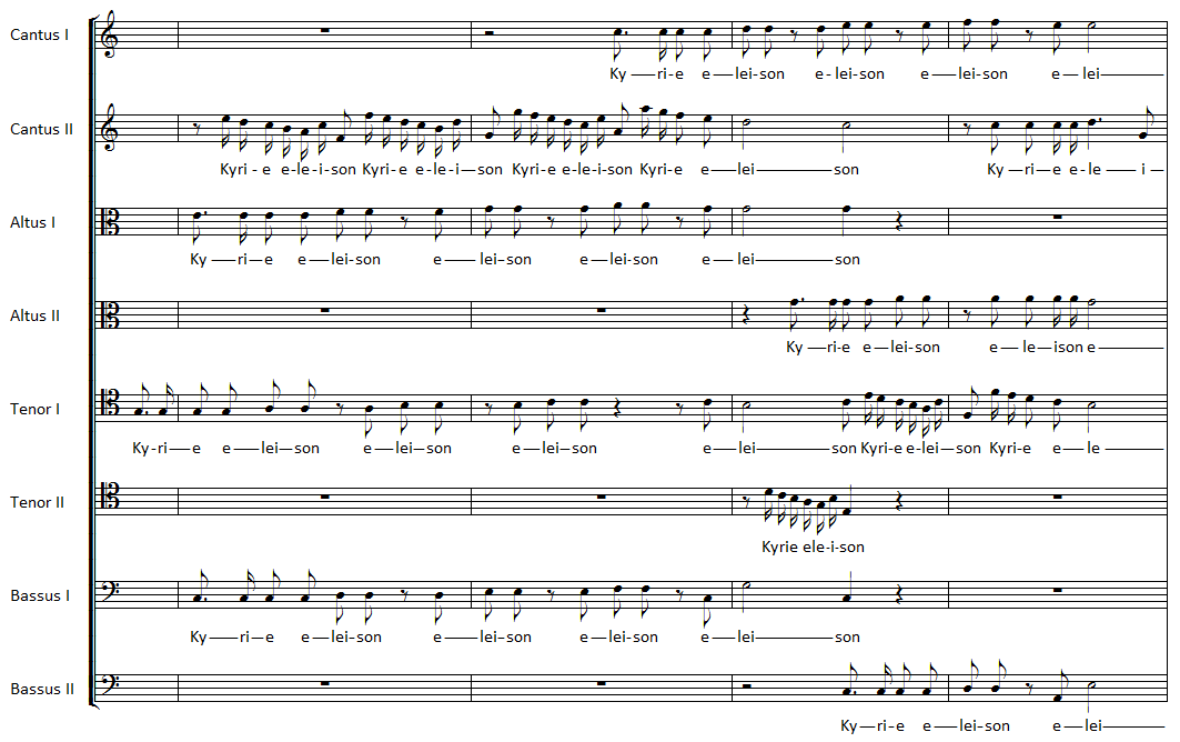 Double sujet de fugue du Kyrie de la Missa Salisburgensis de Heinrich Ignaz Franz von Biber